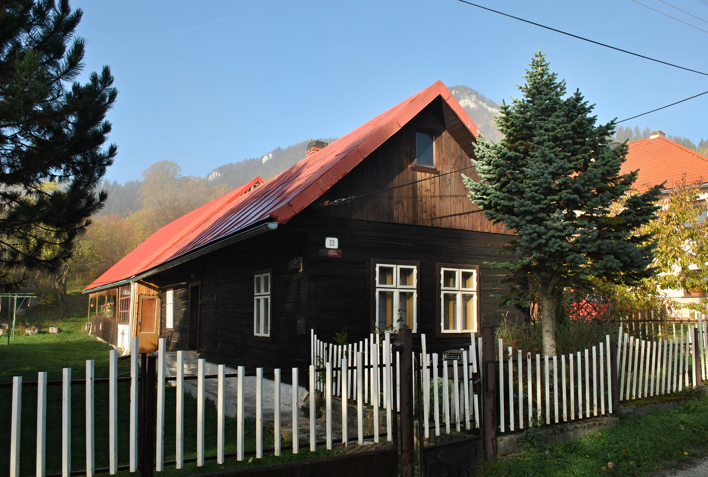 Liptovská Anna, okr. Liptovský Mikuláš - dom č. 33